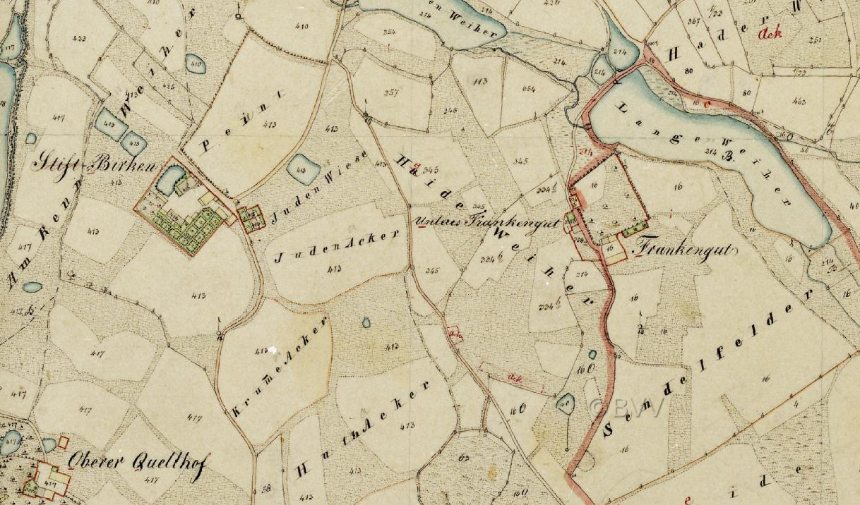 Historische Karte von Bayreuth-Birken